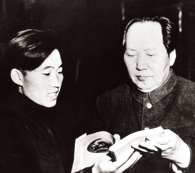 郭树德和毛泽东合影